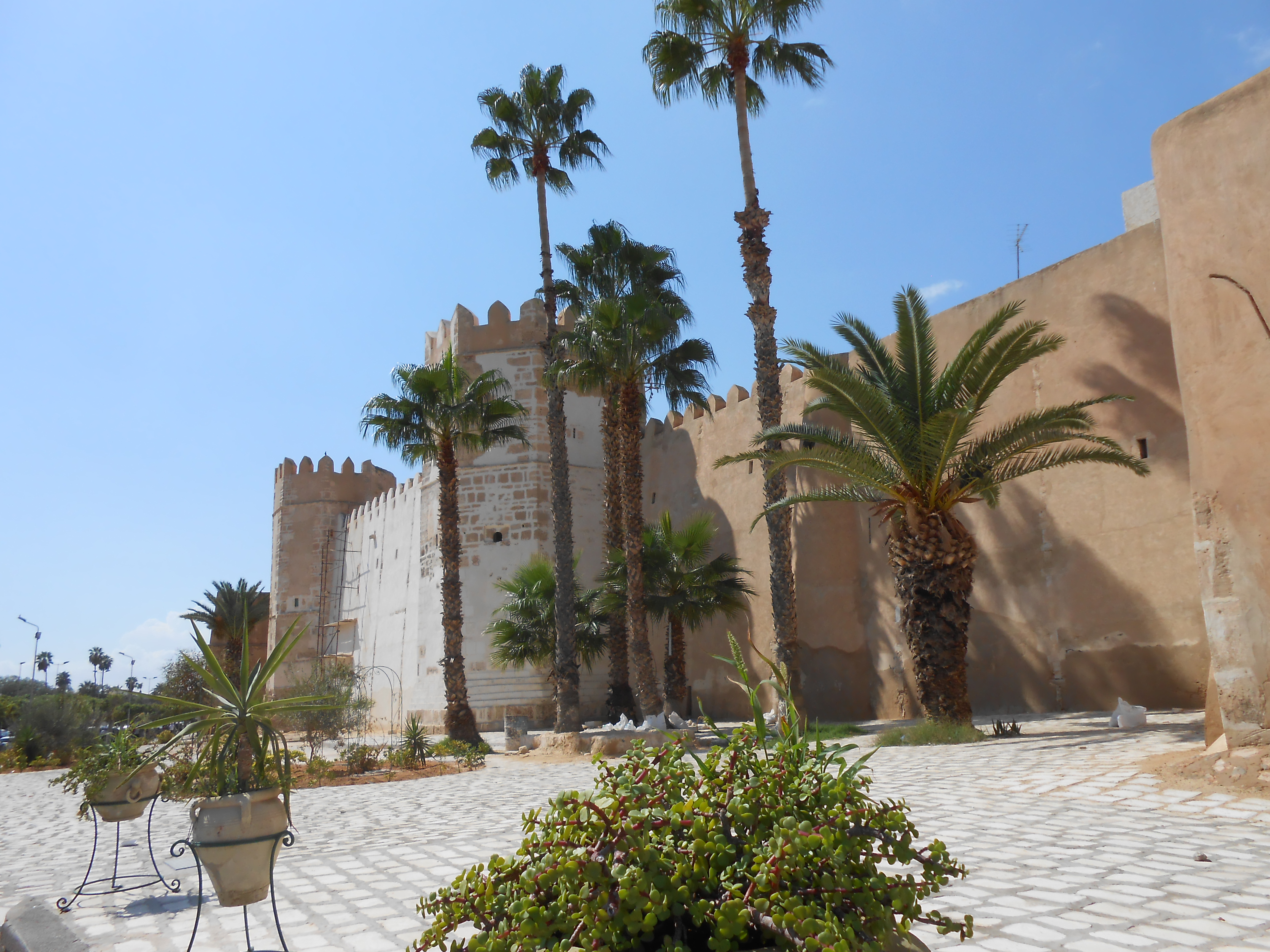 Remparts